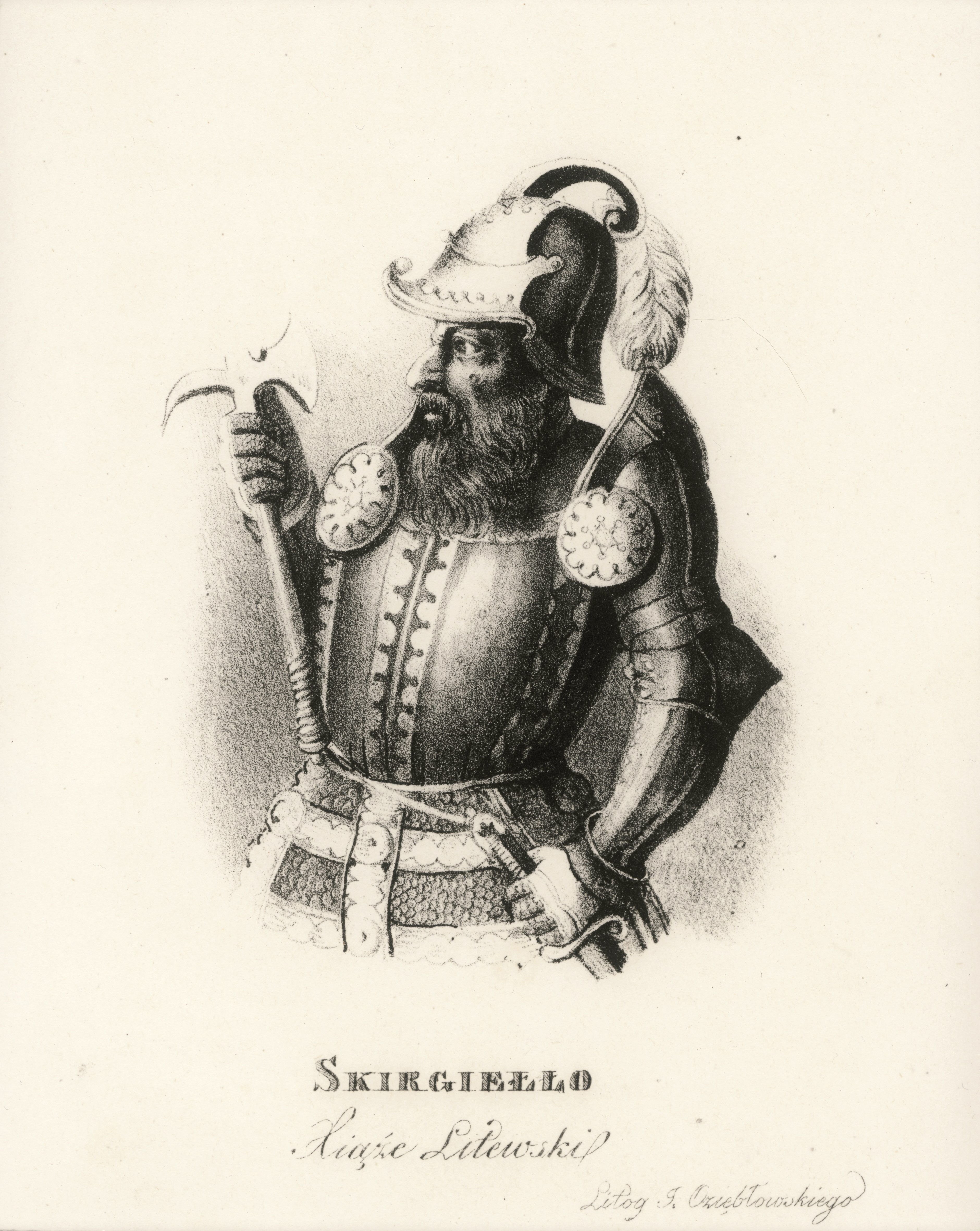 Беларуская (тарашкевіца): Уяўны партрэт Скіргайлы (Skirgajła)